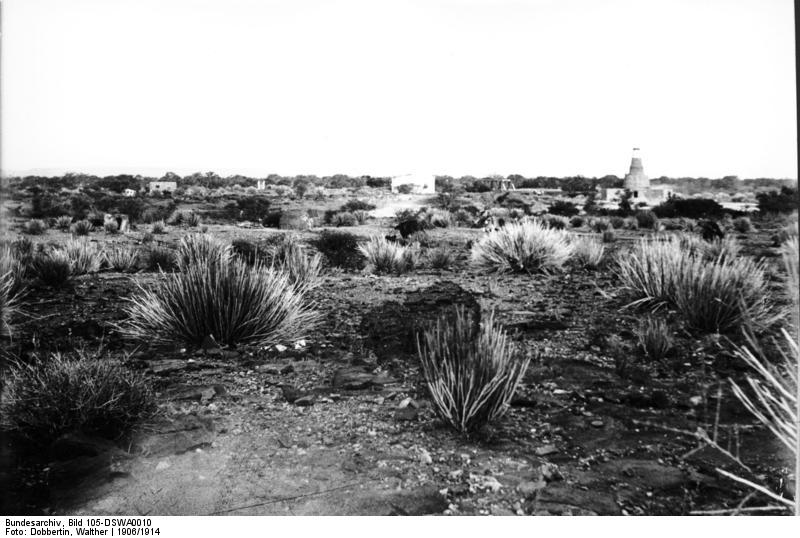 Landschaft bei Sandverhaar mit Milchbüschen